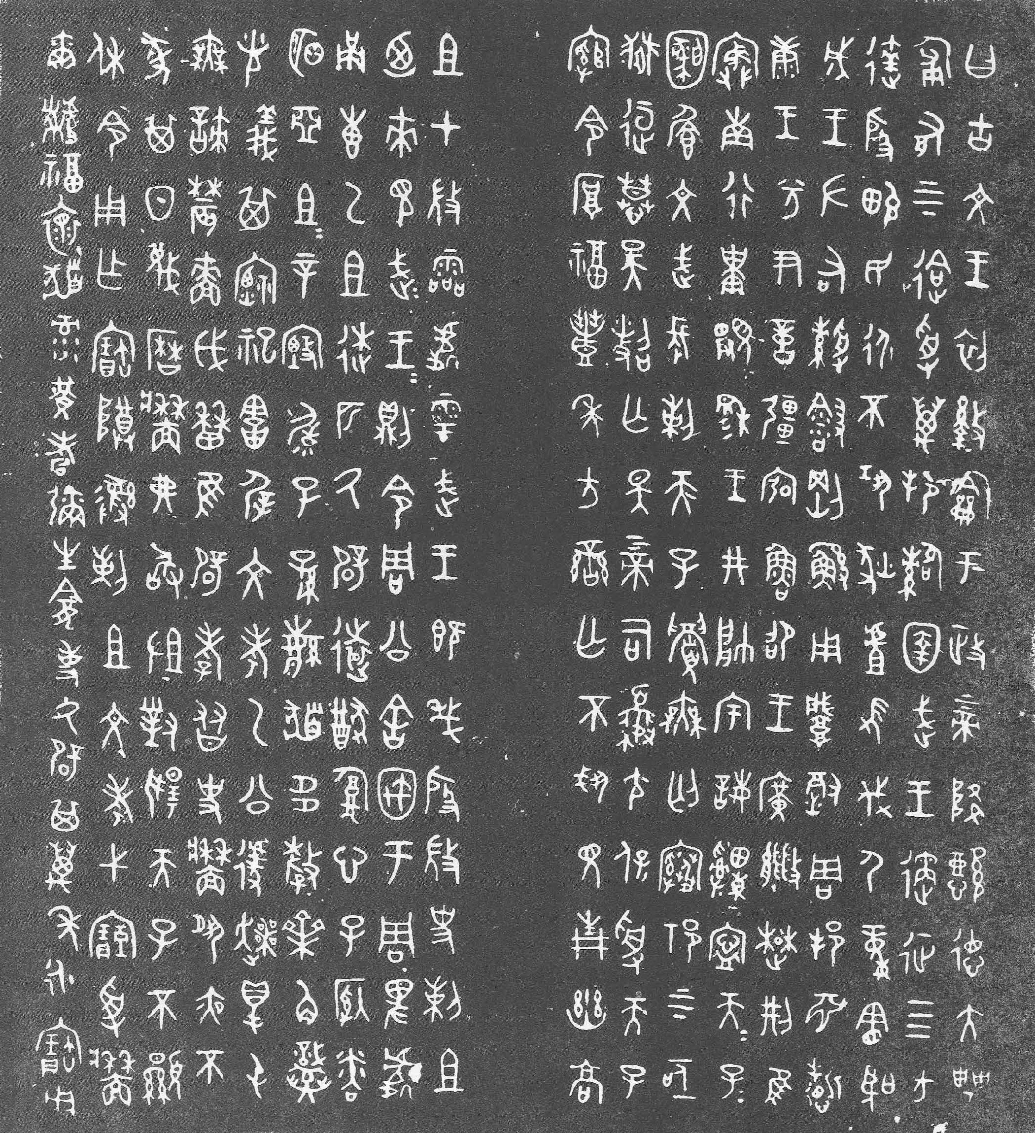 墻盤，又稱"史墻盤"，為西周共王時史官墻所作的禮器。